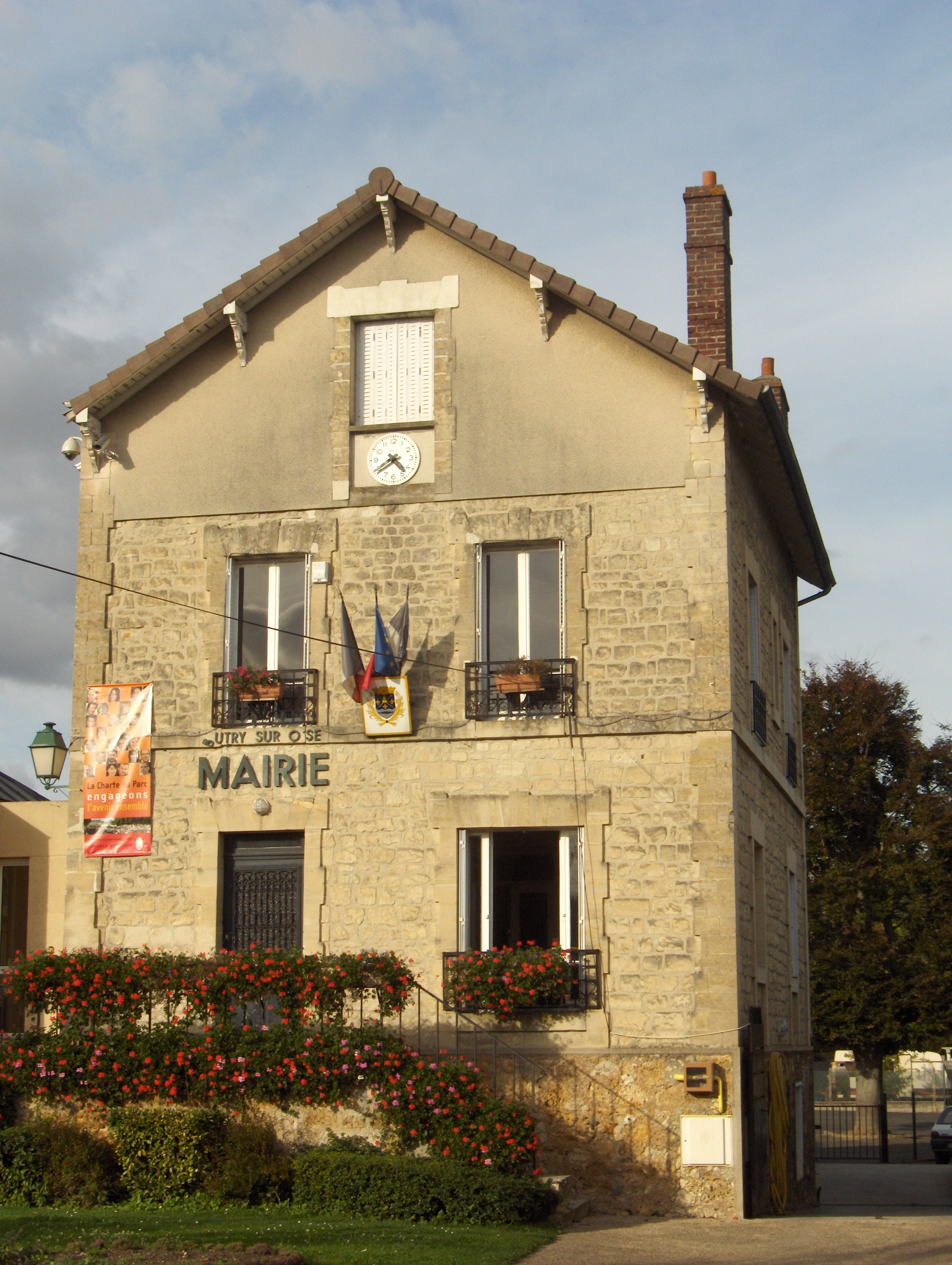 Mairie de Butry-sur-Oise